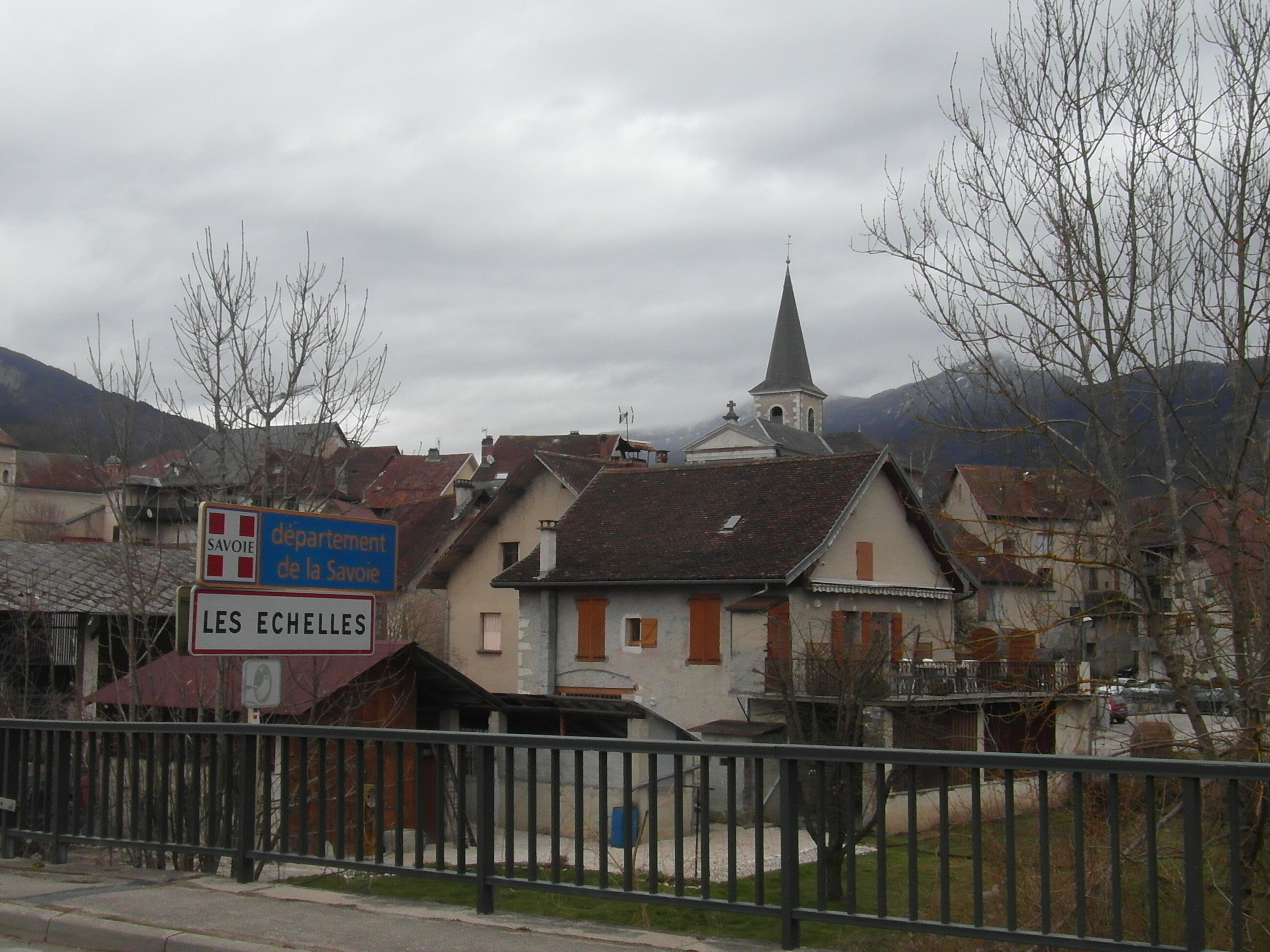 Les Échelles vu du pont de la déviation (RD 102)